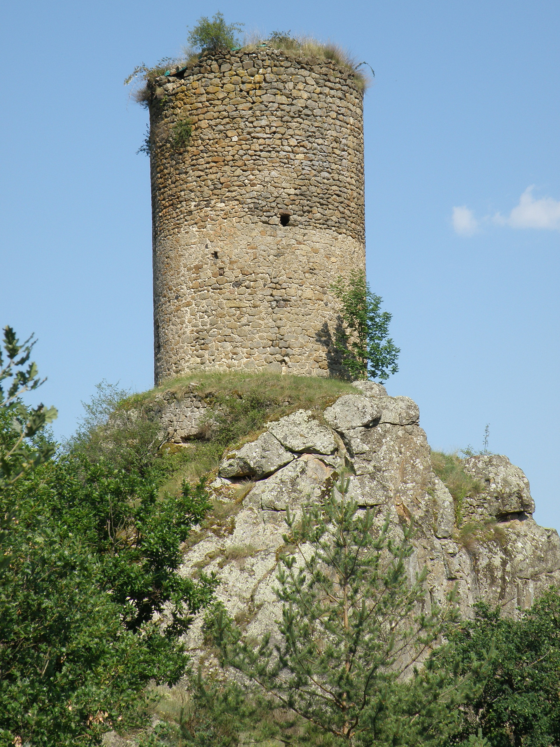 Grandeyrolles, comm. du Puy-de-Dôme (Auvergne, France). Tour dite de Rognon, XIIIe siècle.